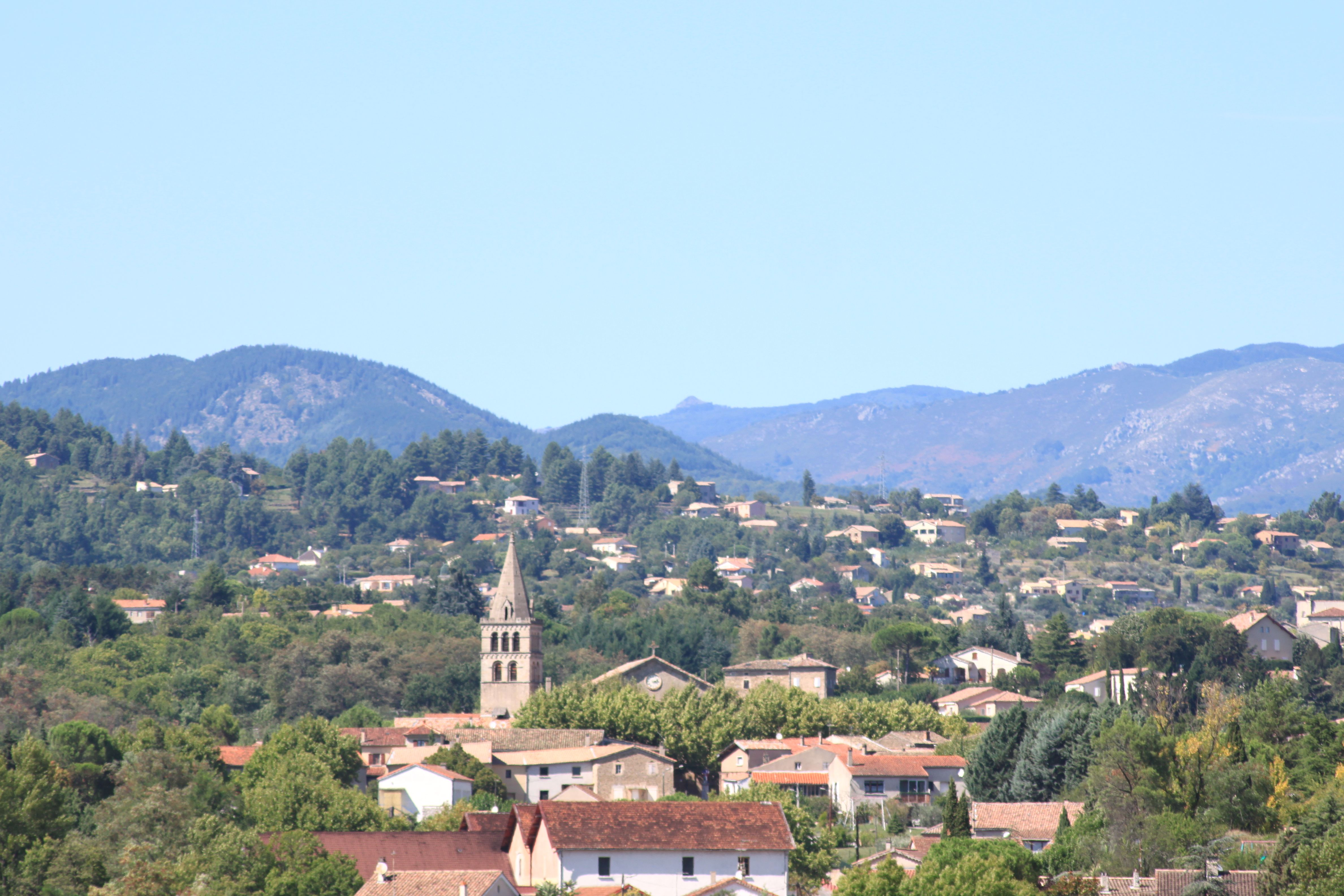 St Etienne de Fontbellon.